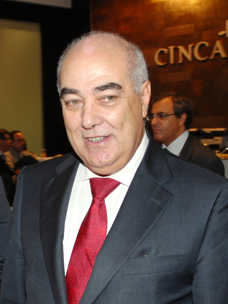 Portuguese Minister Mário Lino at Exponor.